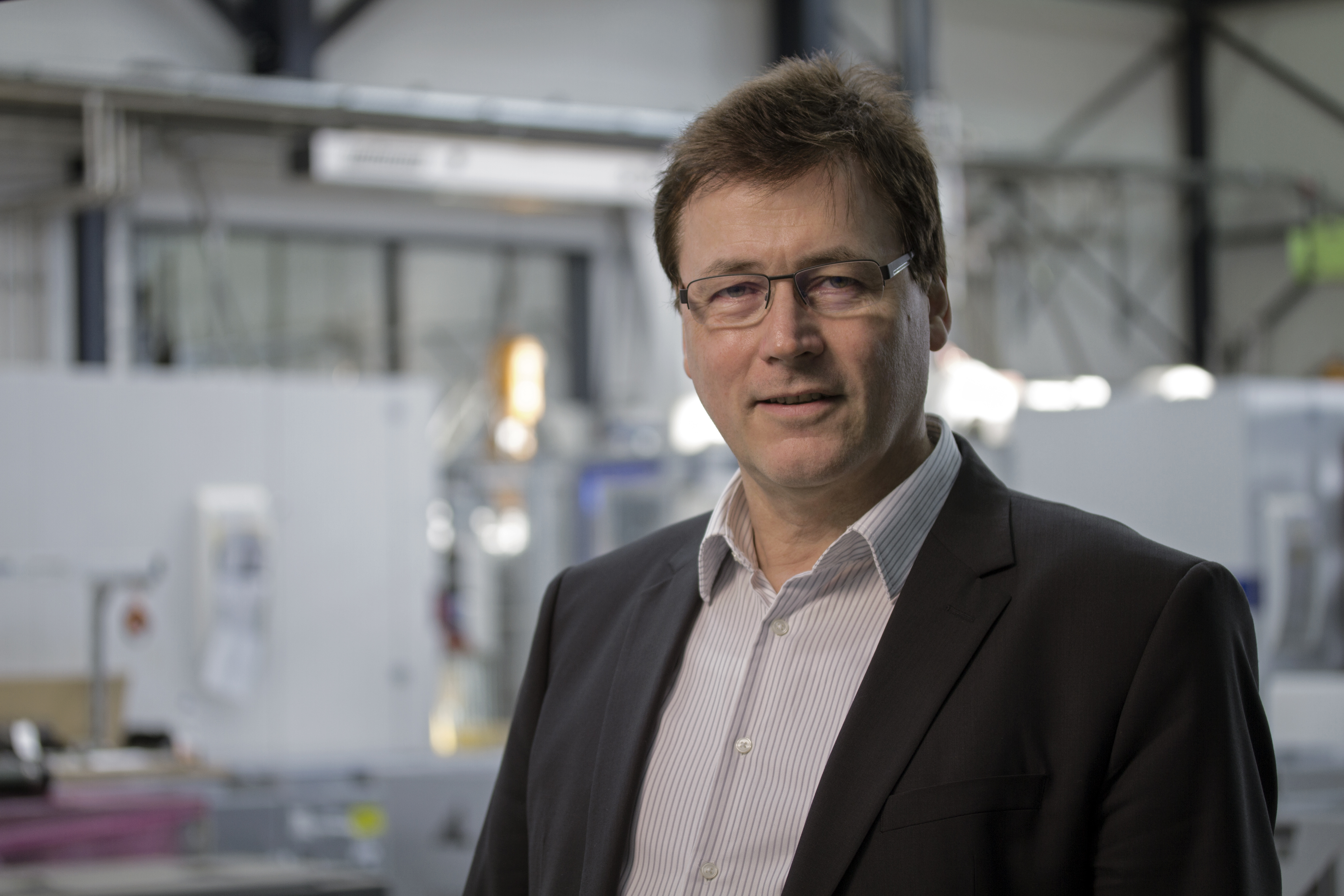 Portrait vom Mitglied des Deutschen Bundestages Gerald Ullrich von 2018, FDP-Fraktion.